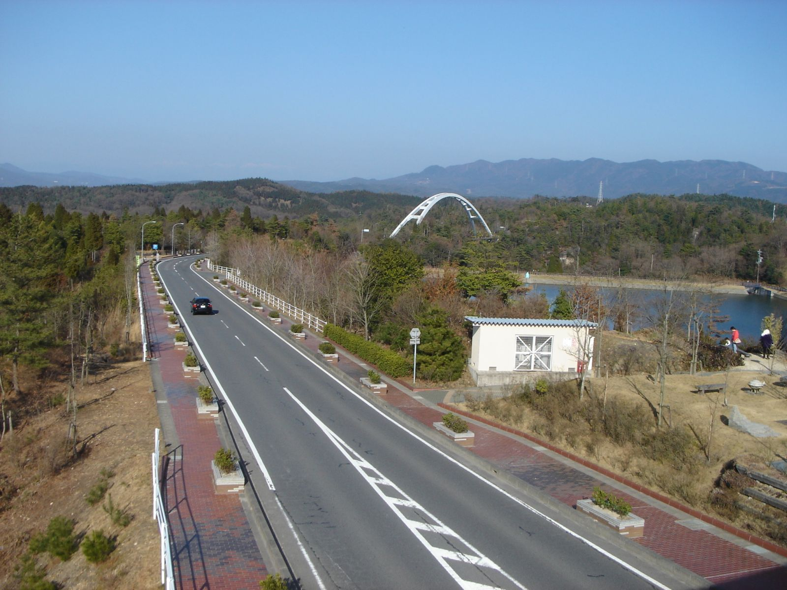 Gifu Prefectural Road 66 in Toki(岐阜県道66号多治見恵那線),Toki,Gifu,Japan(岐阜県土岐市肥田町肥田)で道の駅土岐美濃焼街道の歩道橋上より撮影。奥の橋は稚児岩大橋。